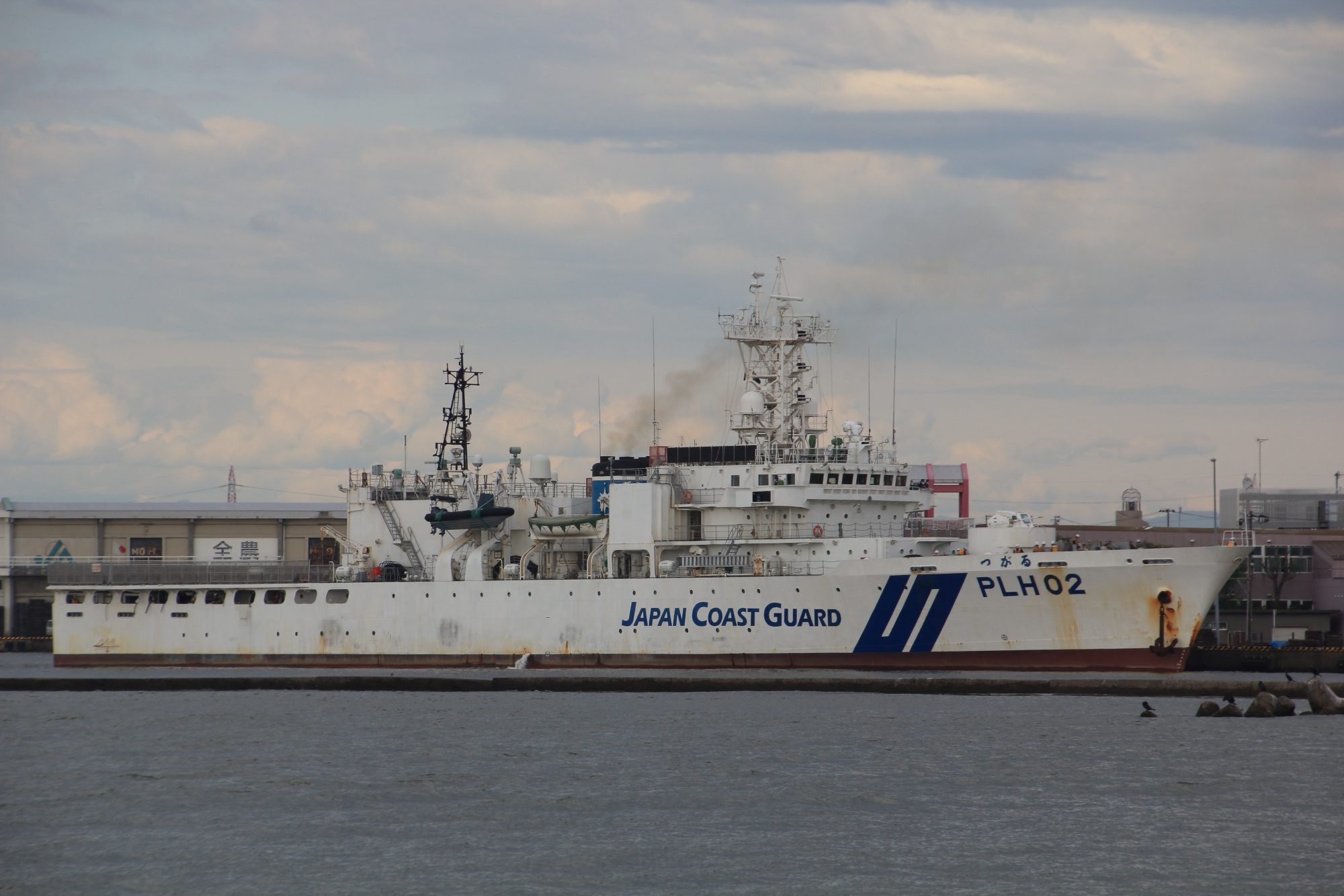 延命工事施工後の「つがる」。新潟西港にて。